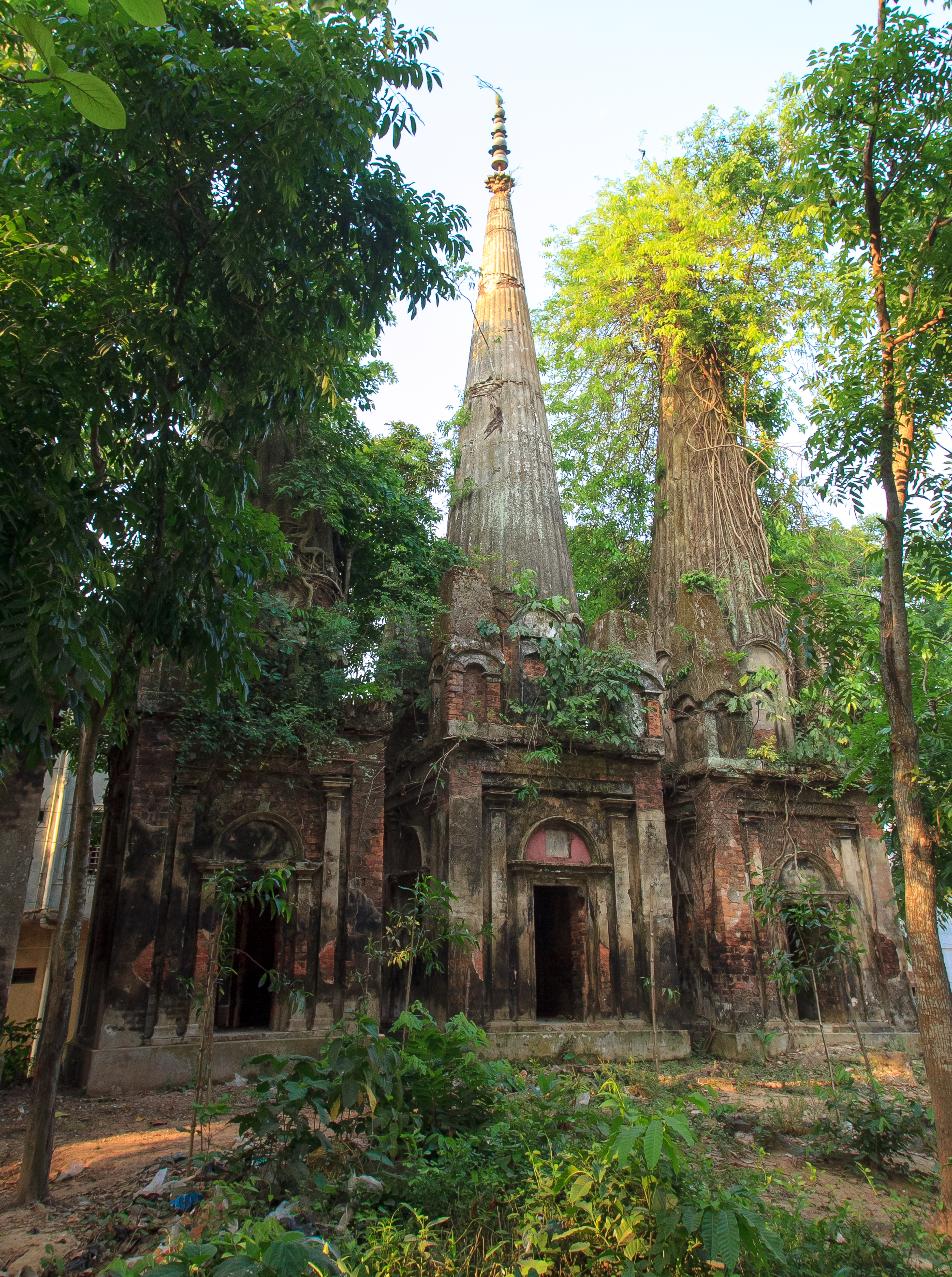 সাত মঠ